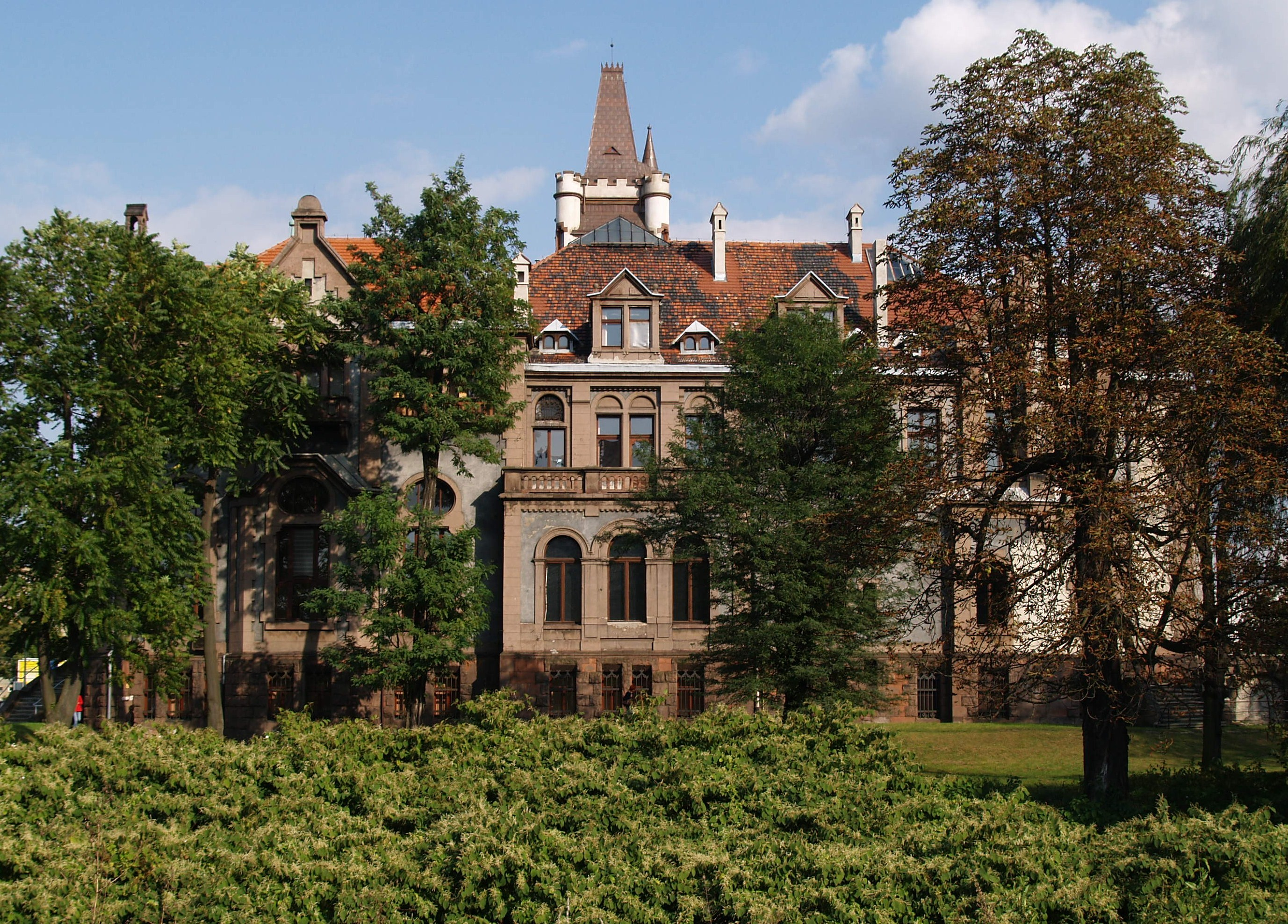 Sosnowiec. Dawny pałac Schoena, obecnie siedziba Sądu Rejonowego Widok od strony rzeki Przemszy. (A/1370/88)